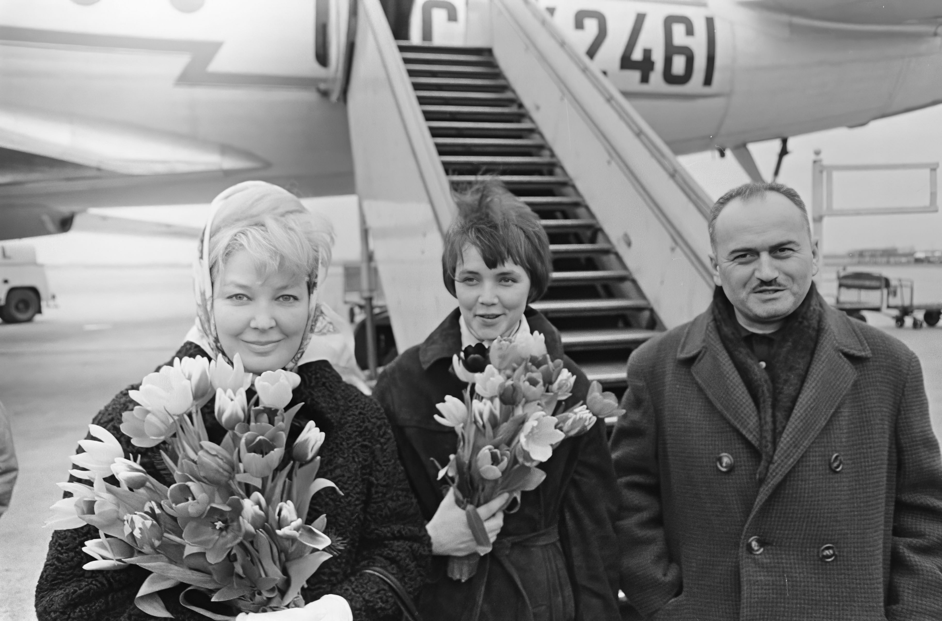 Collectie / Archief : Fotocollectie Anefo Reportage / Serie : [ onbekend ] Beschrijving : Russische filmweek in Cinetol, aankomst op Schiphol van Russische filmmensen, v.l.n.r. Irena Scobtsewa, Lilian Alesjnikowa en Rewaz Tsjeheidz Datum : 24 februari 1966 Trefwoorden : VLIEGVELDEN, aankomsten, filmweken Persoonsnaam : Alesjnikowa, Lilian, Scobtsewa, Irena, Tsjeheidz, Rewaz Fotograaf : Kroon, Ron / Anefo Auteursrechthebbende : Nationaal Archief Materiaalsoort : Negatief (zwart/wit) Nummer archiefinventaris : bekijk toegang 2.24.01.05 Bestanddeelnummer : 918-8257